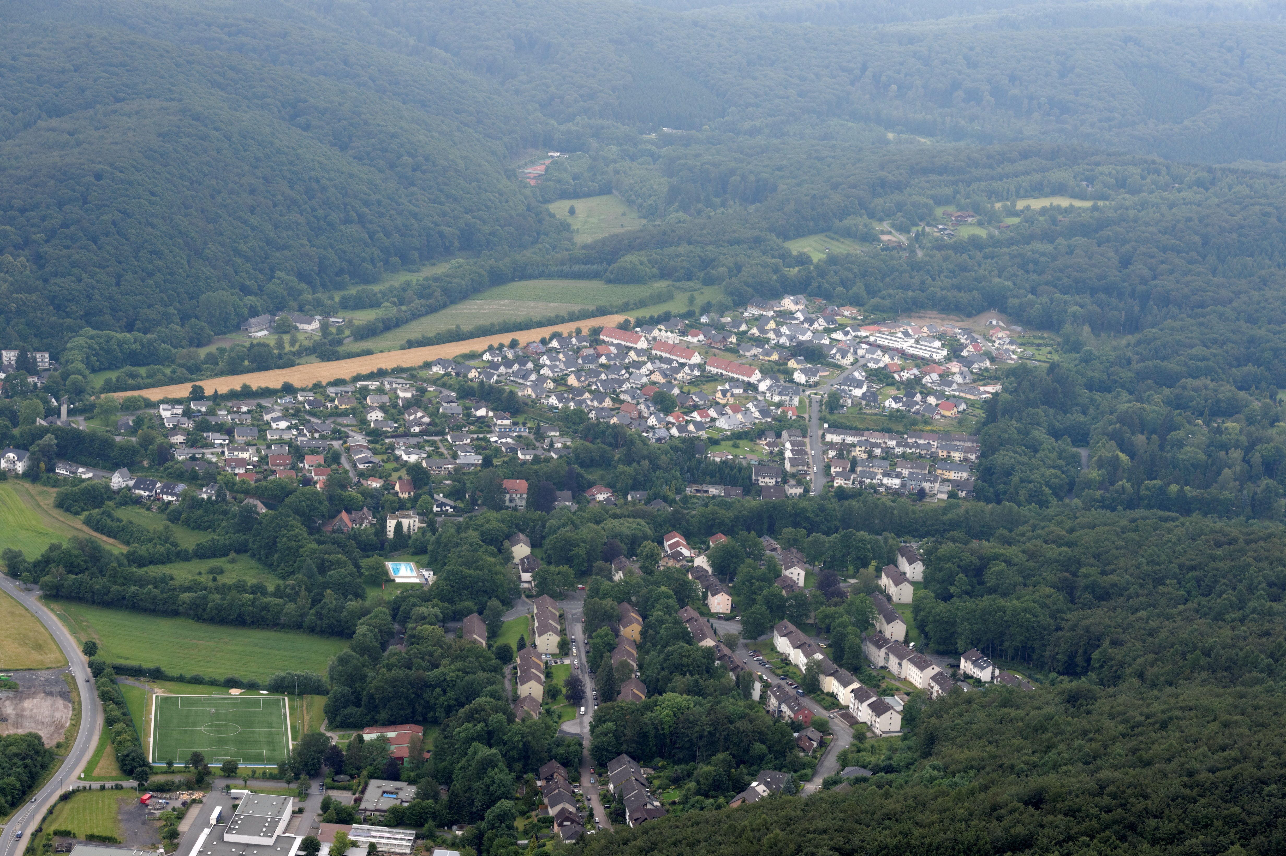 Arnsberg: Vorne Teilansicht Wohngebiet Gierskämpen, dahinter Wohngebiete Dickenbruch, Austfeld und ehemalige Jägerkaserne (Fotoflug Sauerland Nord) The making of this document was supported by the Community-Budget of Wikimedia Germany.